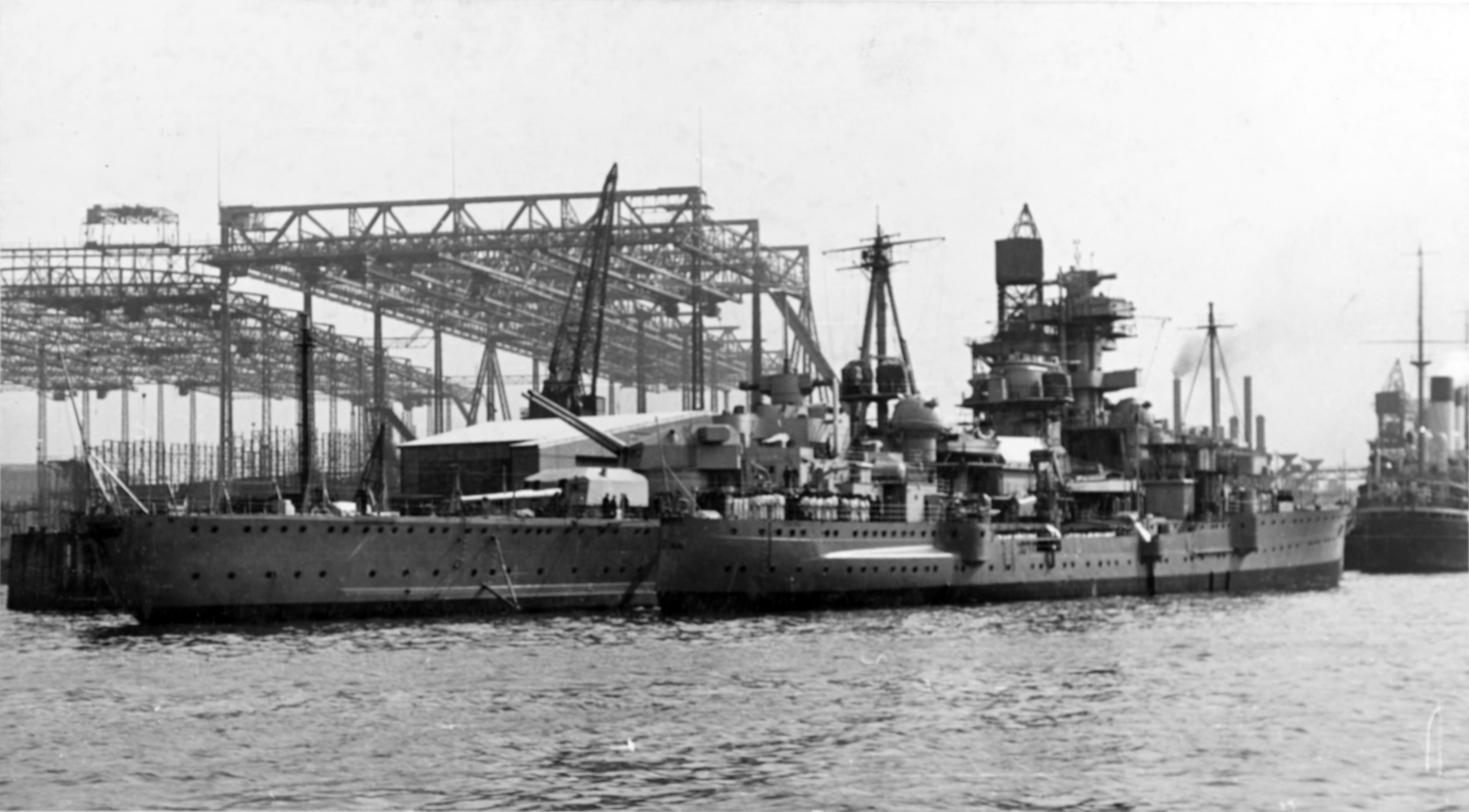 El crucero alemán Admiral Hipper en el astillero de Hamburgo en 1937